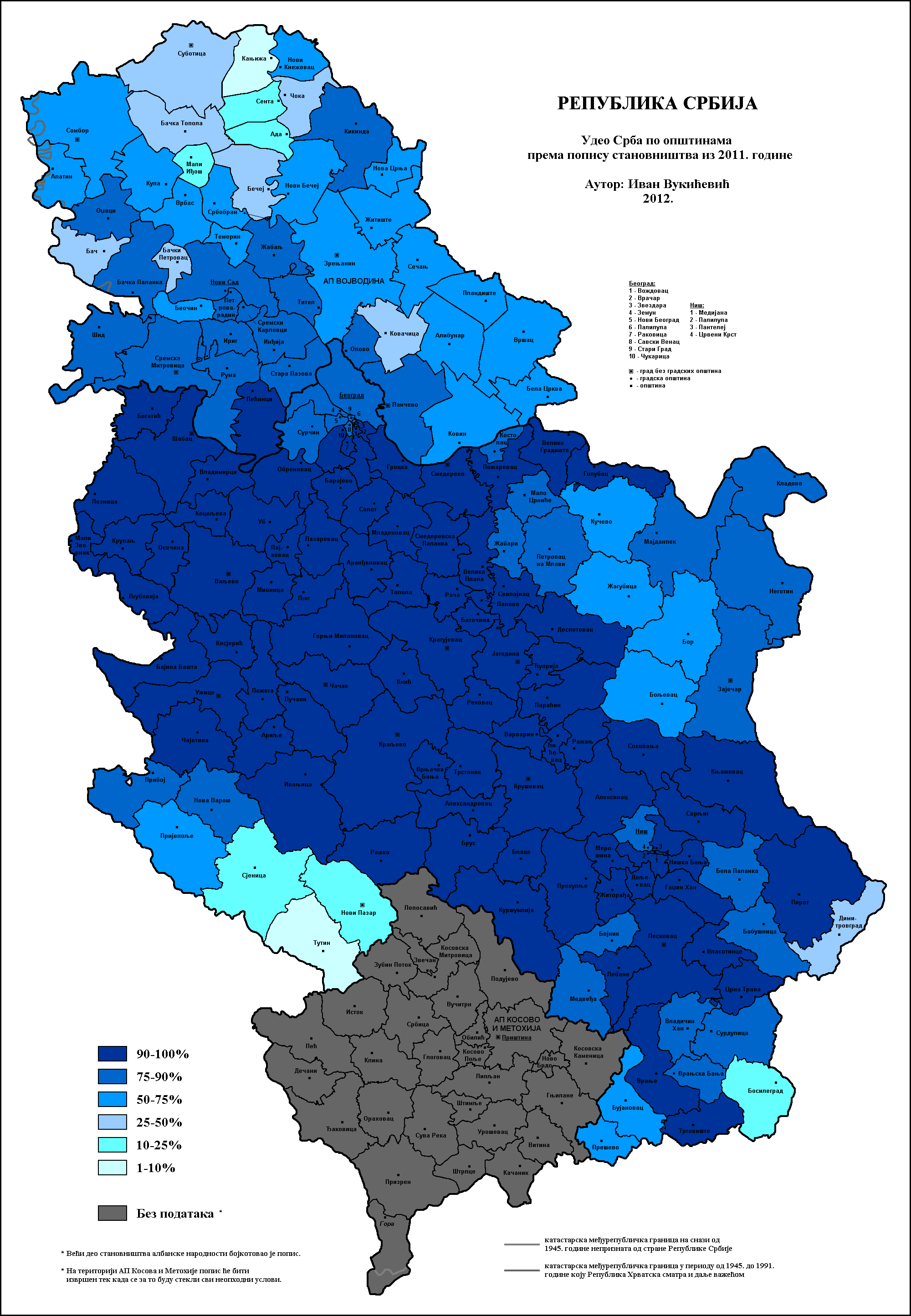 Удео Срба у Србији по општинама 2011. године. Аутор: Иван Вукићевић